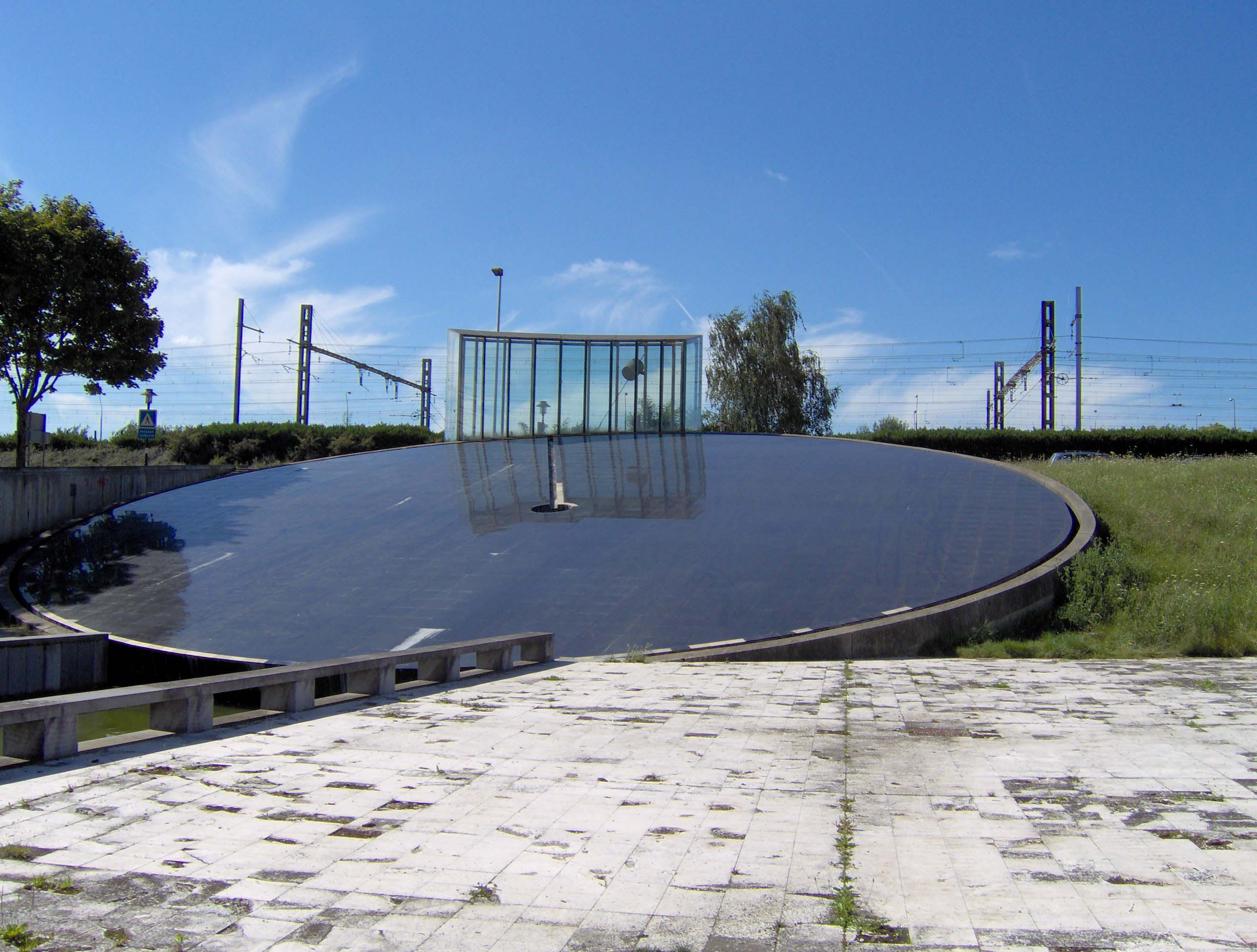 Source de la Bièvre à Montigny-le-Bretonneux.